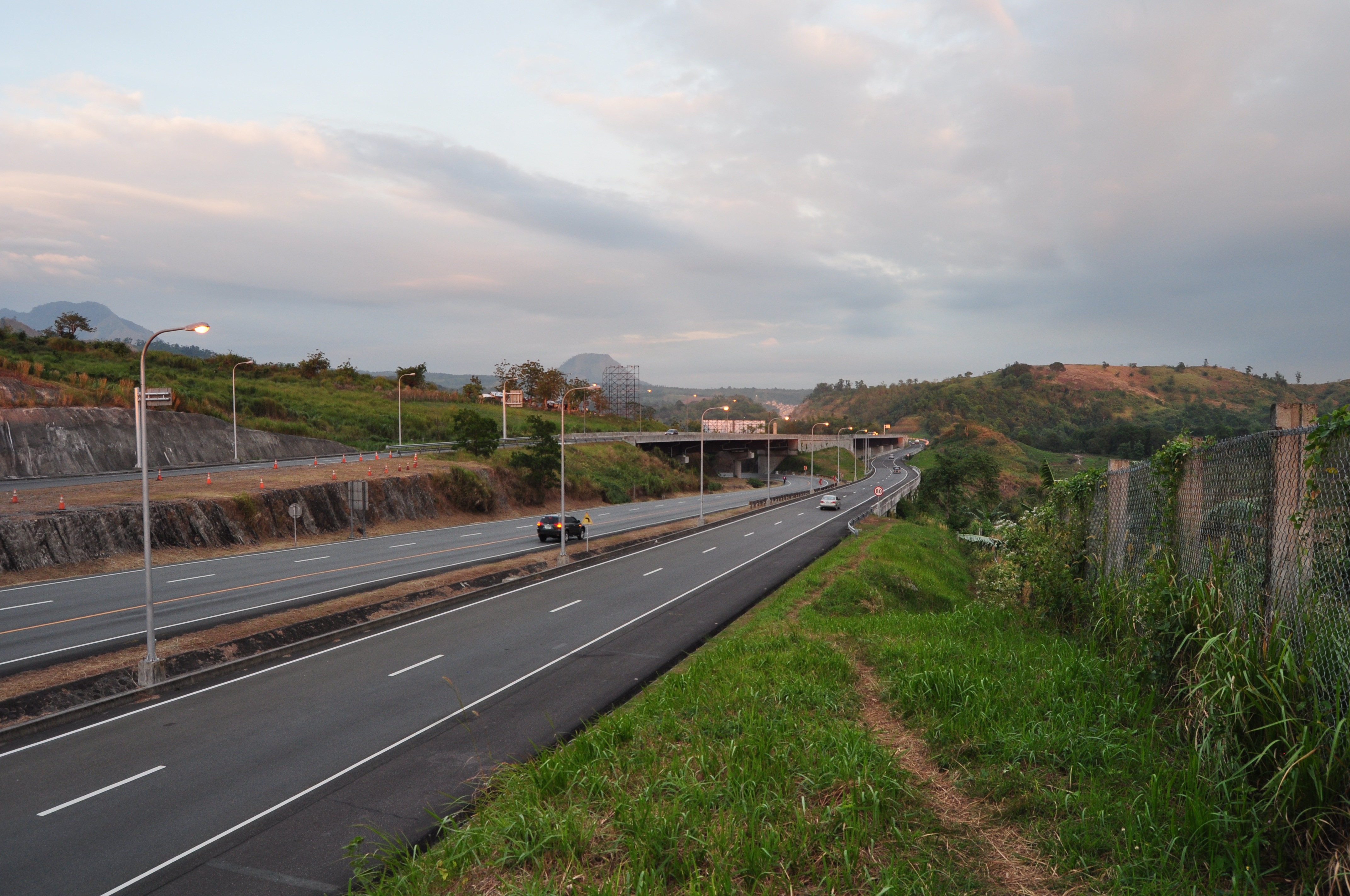 Tipo, Bataan, Philippines